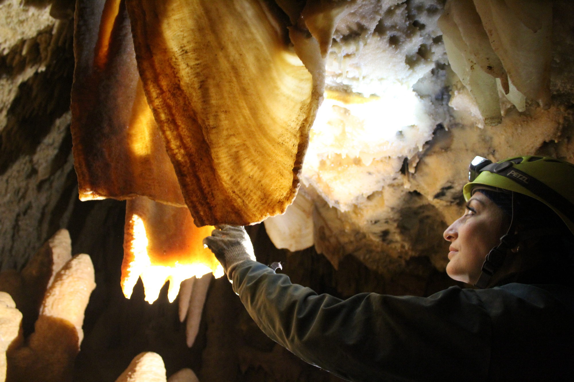 Concrezione a vela che evidenzia la varietà dei colori dati dalla consistenza chimica della struttura calcitica.